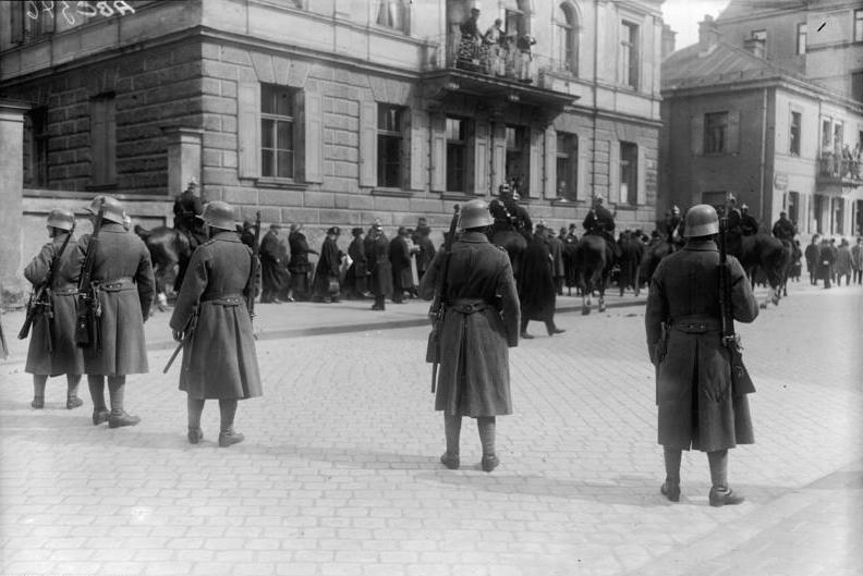 Zu der Urteilssprechung im Hitler-Ludendorf Prozess in München am 1. April 1924. Strenge Absperrungsmaßnahmen vor der Kriegsschule, um eine Störung des Urteils zu verhindern.